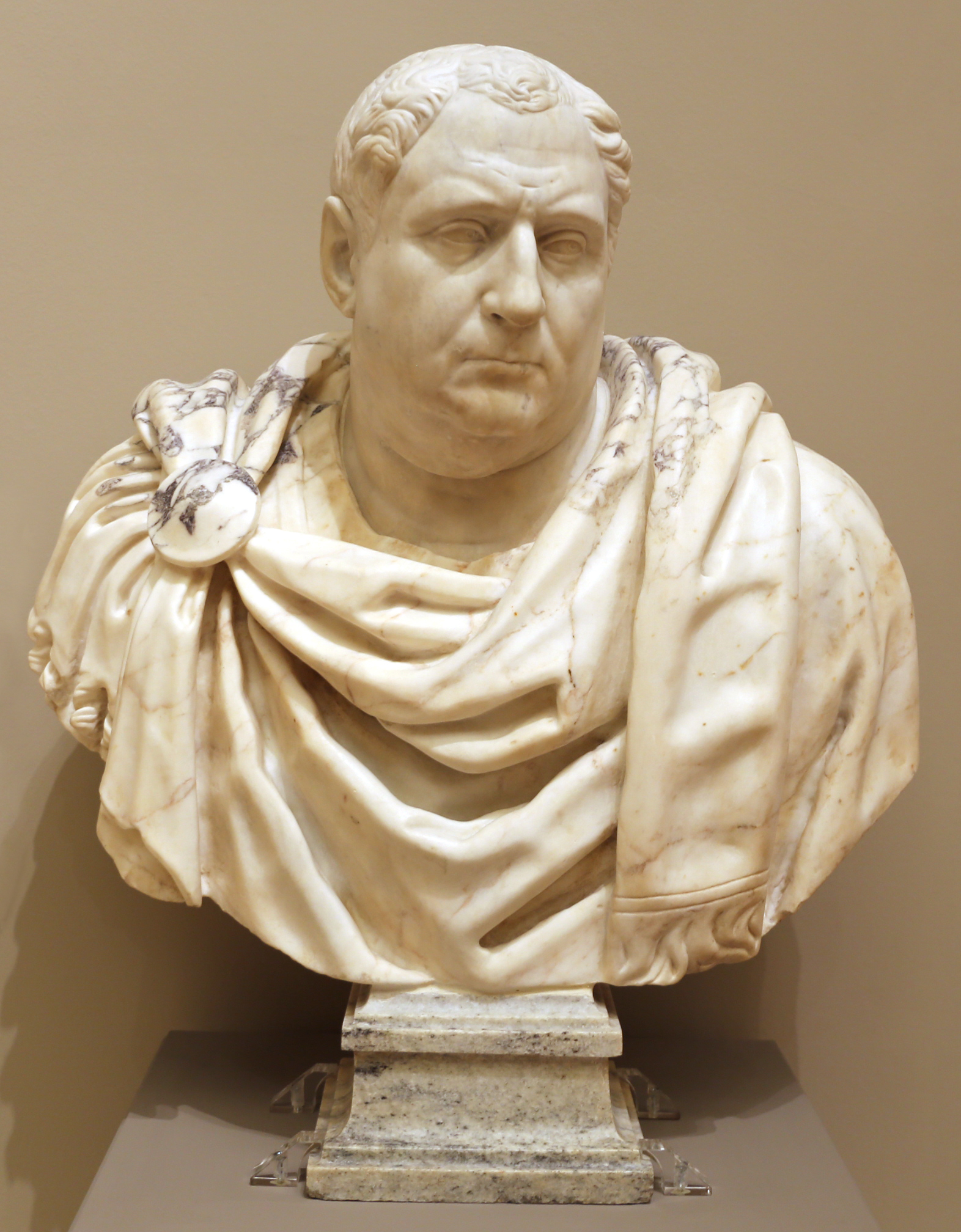 Palazzo dei Musei (Modena) This is a photo of a monument which is part of cultural heritage of Italy.